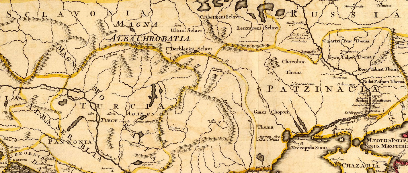 Położenie Białej Chorwacji